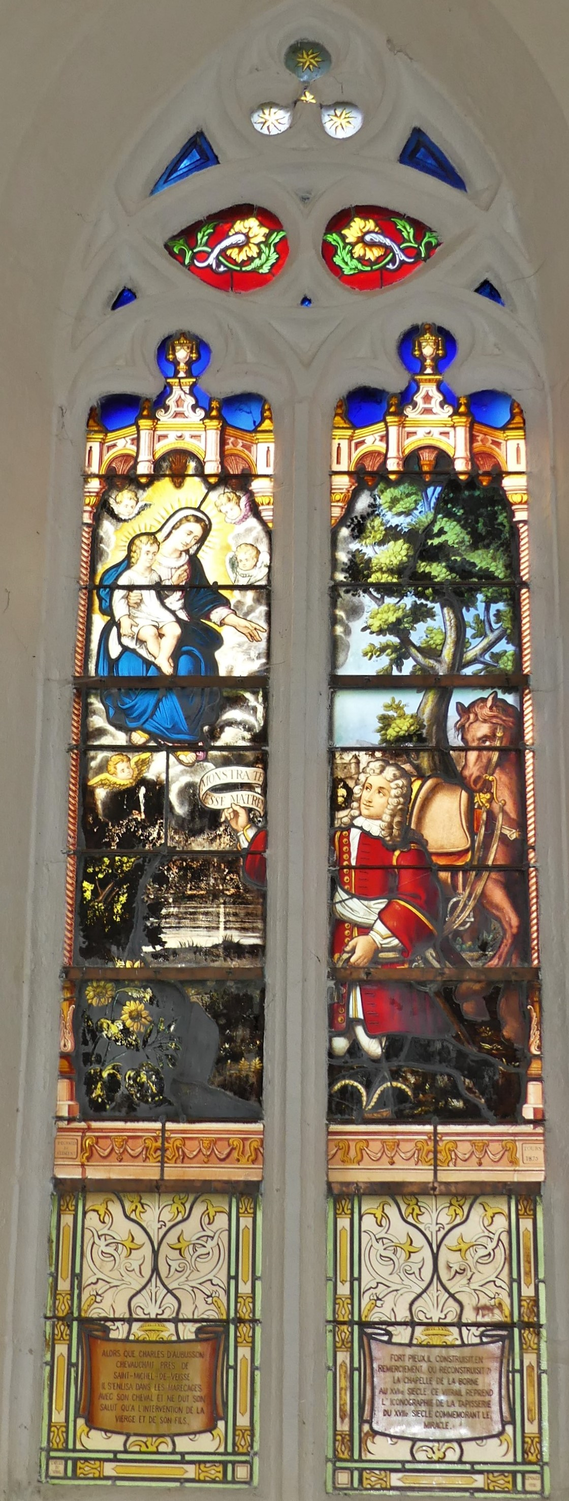 Verrière de la chapelle sud réalisée en 1875 par l'atelier Fournier Clément, chapelle de la Borne, Saint-Michel-de-Veisse, Creuse, France.